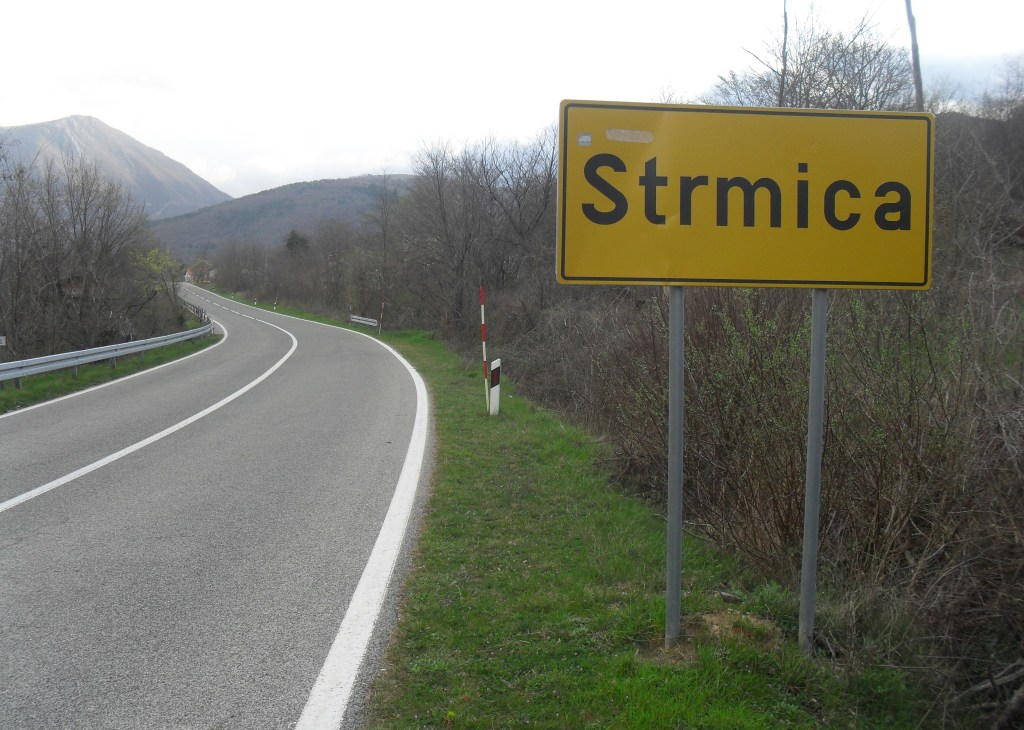 Улаз у Стрмицу из правца Книна.